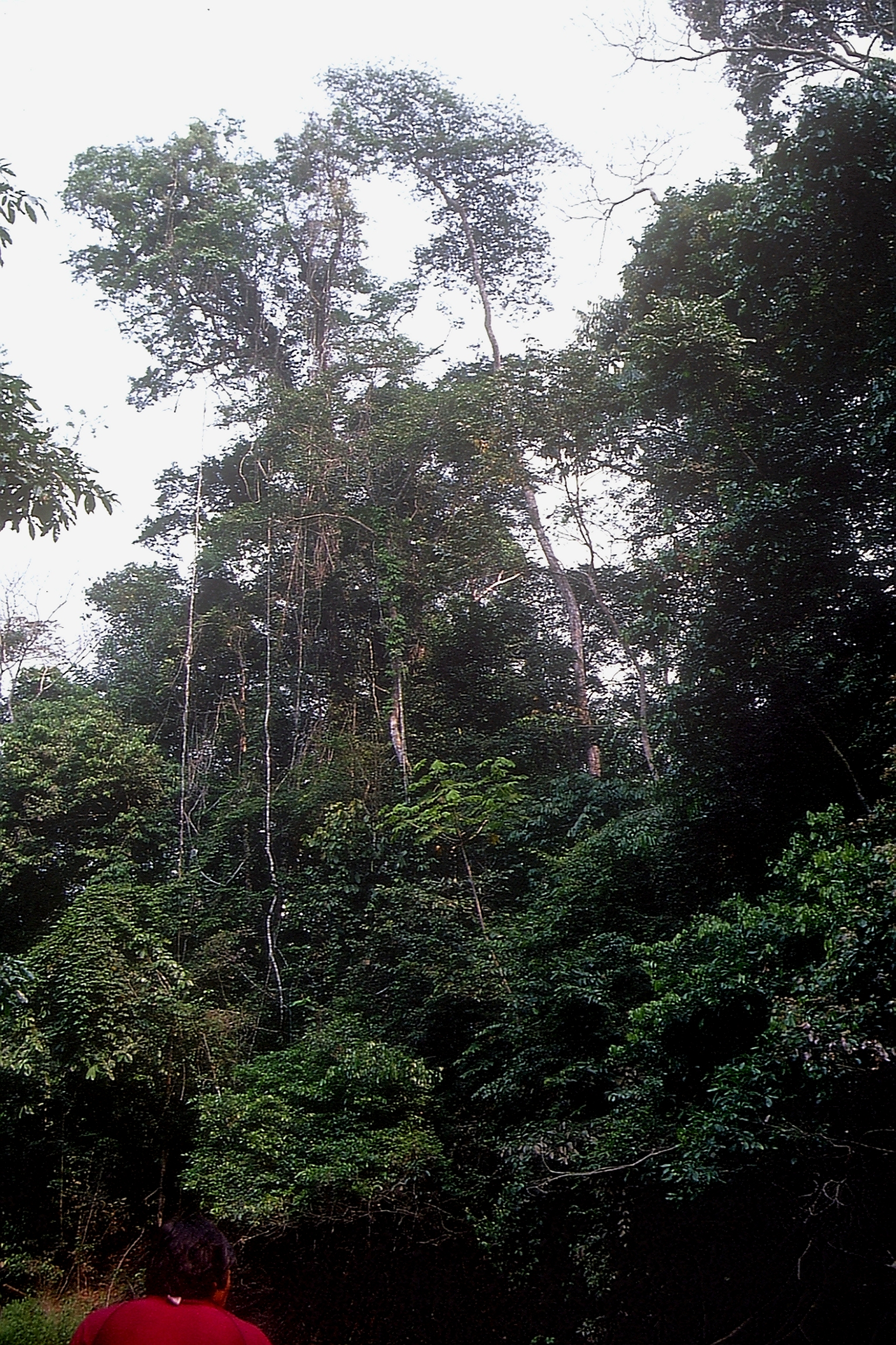 Artenreicher tropischer Regenwald in der Region Madre de Dios, Peru